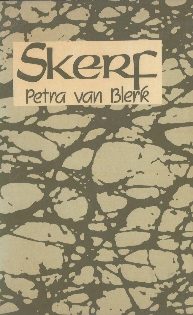 Boek Skerf